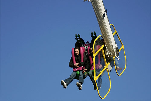 Basler Herbstmesse 2005: "Extrem"